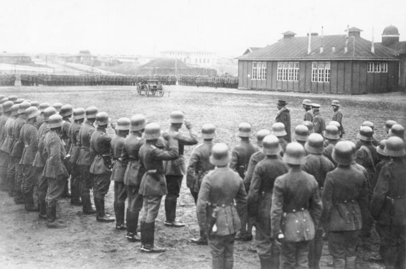 Der Januar 1919 in Berlin Der Reichswehrminister Noske besichtigt das konterrevolutionäre Freikorps Hülsen, einen Teil der "Abteilung Lüttwitz", zu der auch das "Freiwilligen Landesjägerkorpfs", die 17. und 31. Infanterie-Division und das Landesschützenkorps gehören. 3855-19